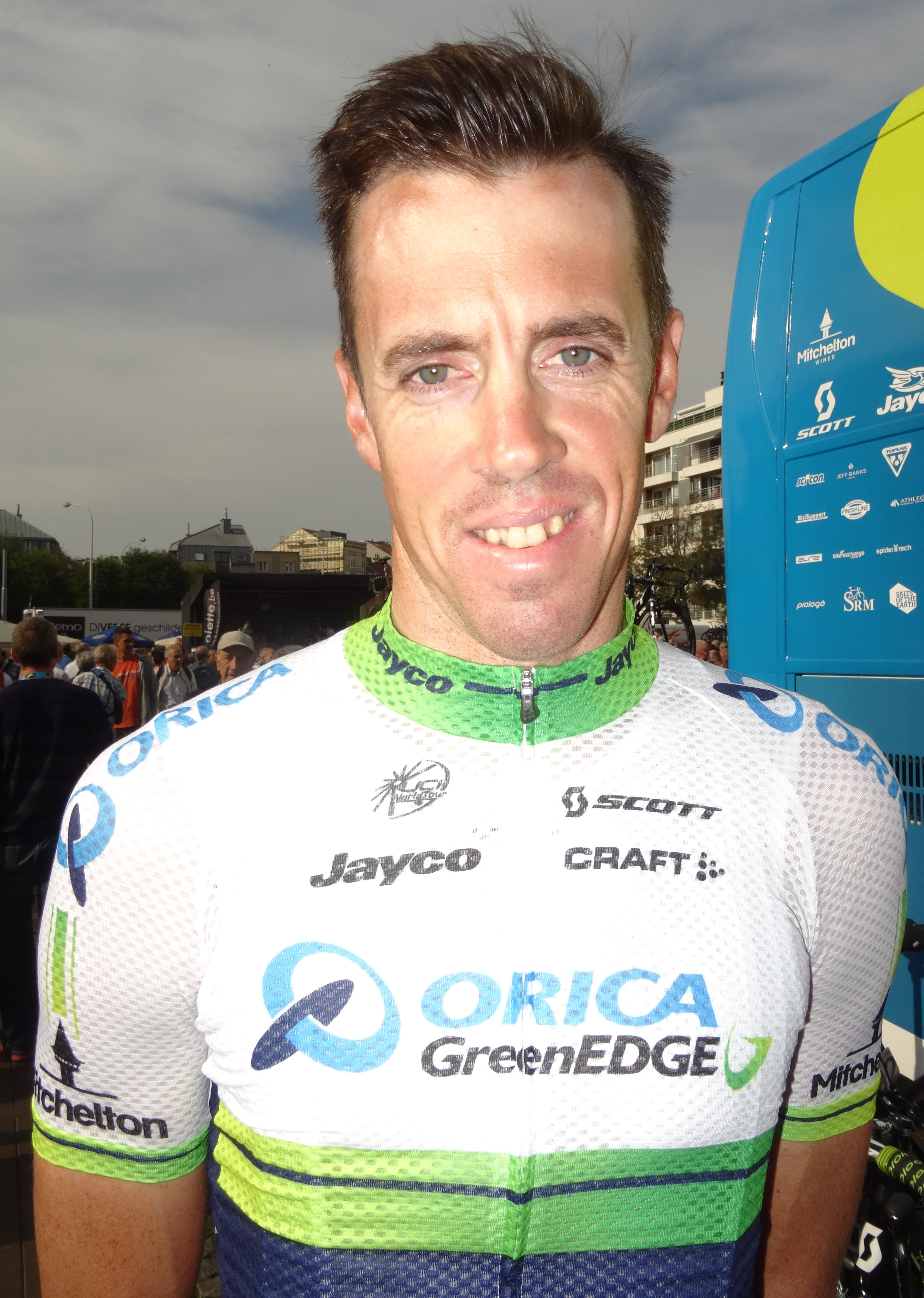 Reportage photographique réalisé le samedi 4 octobre à l'occasion du départ de la troisième étape de l'Eurométropole Tour 2014 à Blankenberge, Belgique.